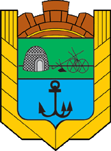 Герб Бердянського району